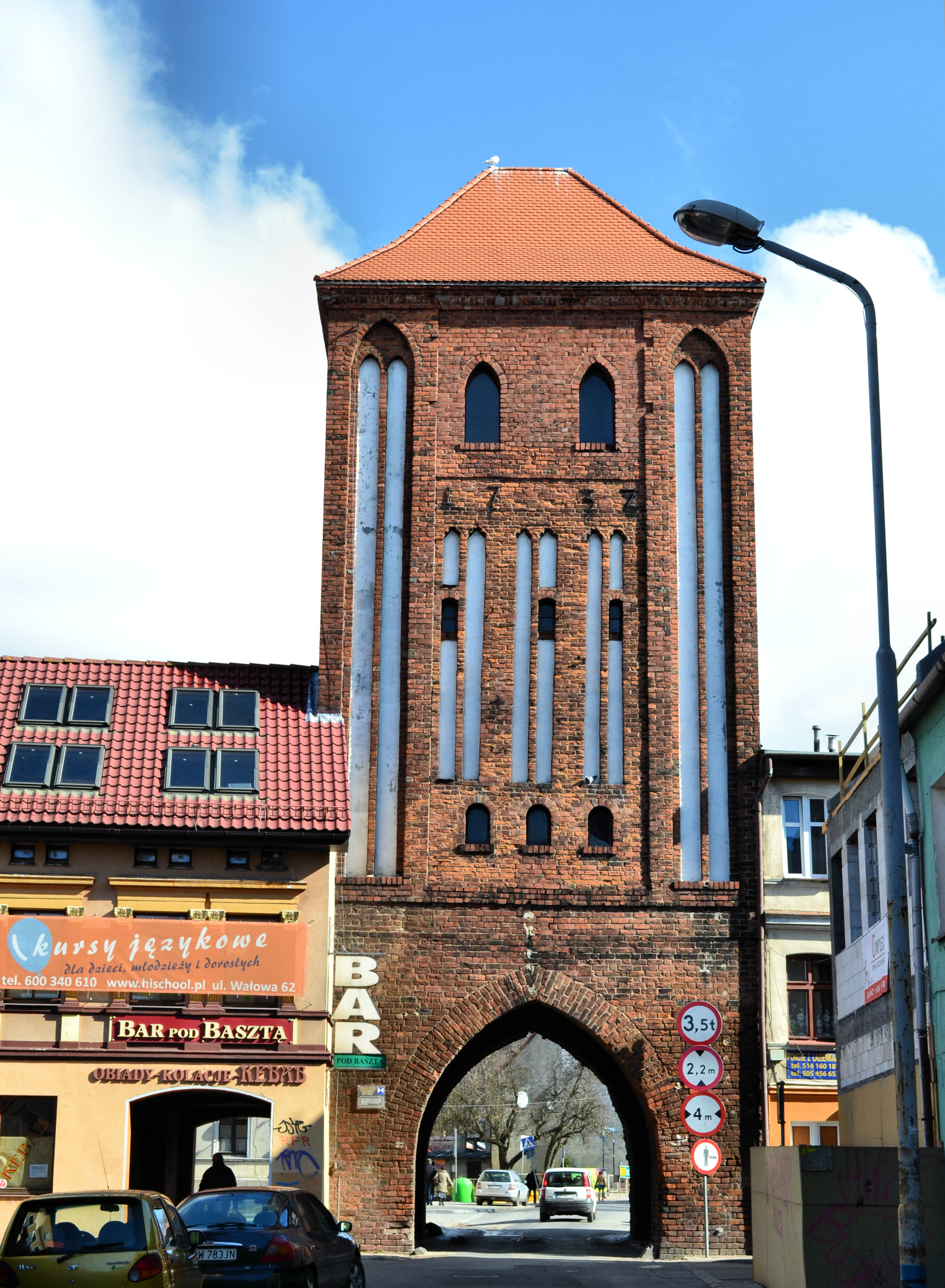 Darłowo, ul. Powstańców Warszawskich - Brama Wysoka (Kamienna) w zespole murów miejskich (zabytek nr 93 z 25.05.1955)